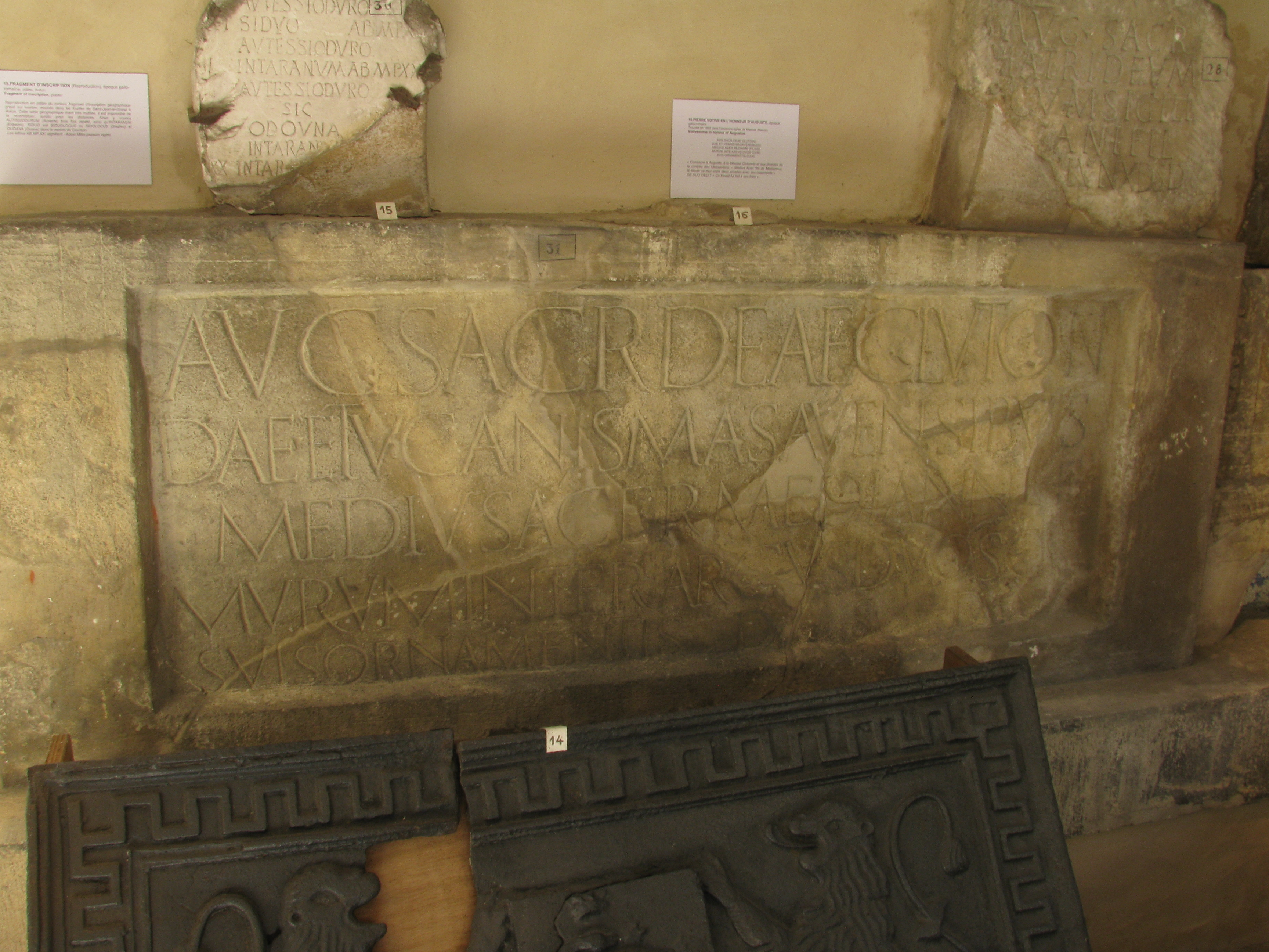 Premier plan : Pierre Votive trouvée à Mesves-sur-Loire (Nièvre). Époque gallo-romaine. Dépôt lapidaire de la porte du Croux (Nevers). La partie droite, manquante a été reconstituée. Il y est question de la déesse Clutonda (Première ligne CLVTONDAE), et de la population du vicus de Masava (VCANIS MASAVENSIBUS) En haut : miliaire CIL XVII² 490 = CIL XIII 2681 (2, p 670) = D 05838 = CAG-71-01, p 175 = AE 2006, +00034 : [---]XVI / [---] / [---]II / [---] / [---] / [---] / [---] / [3]XXX / [ // ]AIIC[---] / Autessioduro [---] / siduo ab m(ilia) p(assuum) XX[---] / Autessioduro [---] / Intaranum ab m(ilia) p(assuum) XX[---] / Autessioduro [---] / SIC [---] / ODOVNA[---] / Intaranum [---] / Intar[anum // ]X[---] / [--- Li]ngonum m(ilia) [p(assuum) ---] / [---]C [---] / [Leuco]rum V[---] / [---]CA [---]